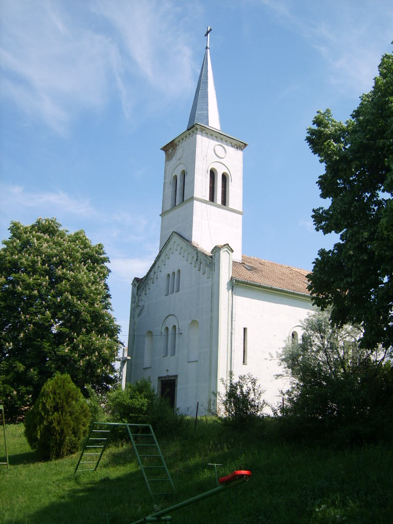 Martonfa temploma